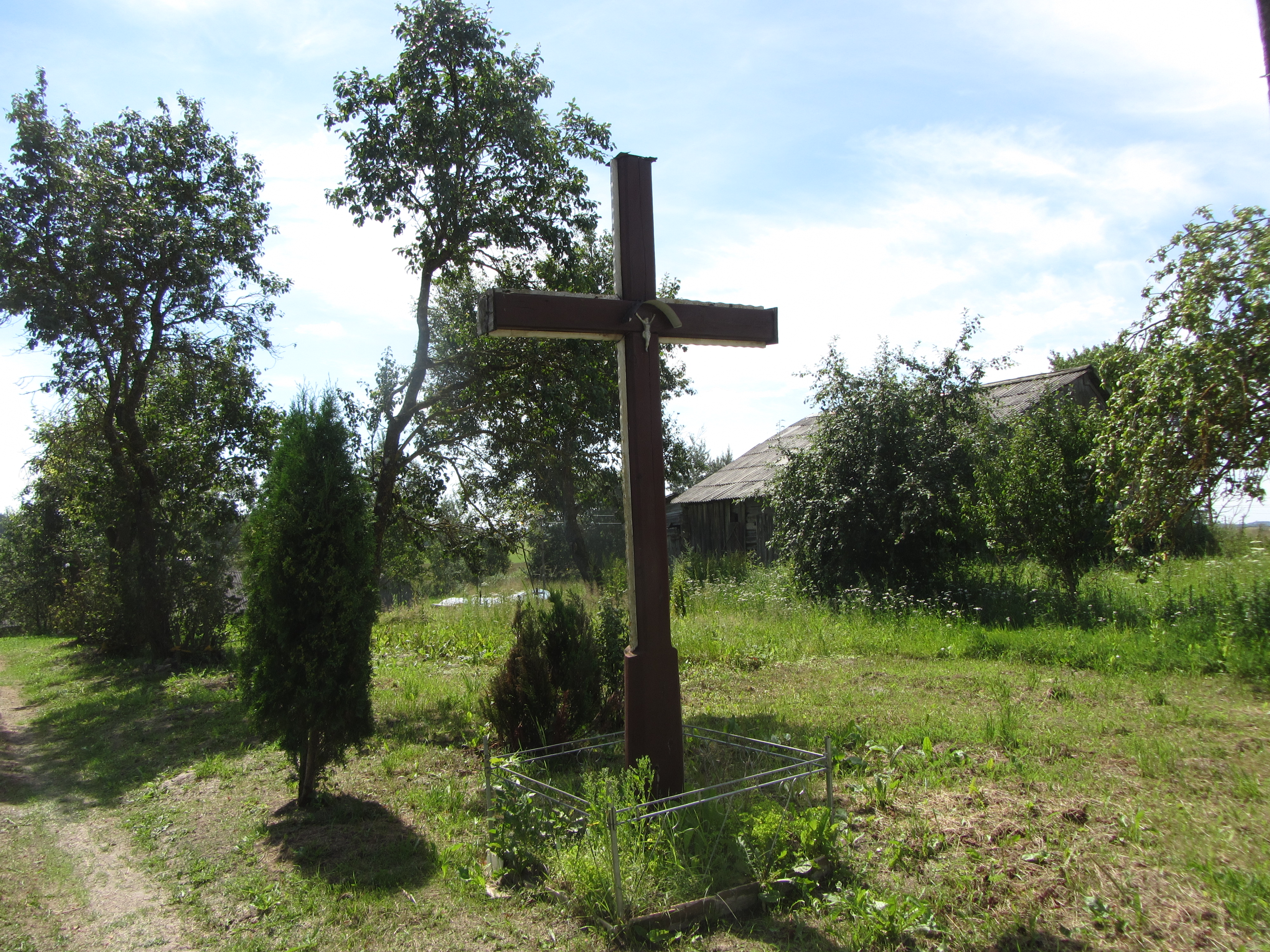 Žydavainiai, Lithuania